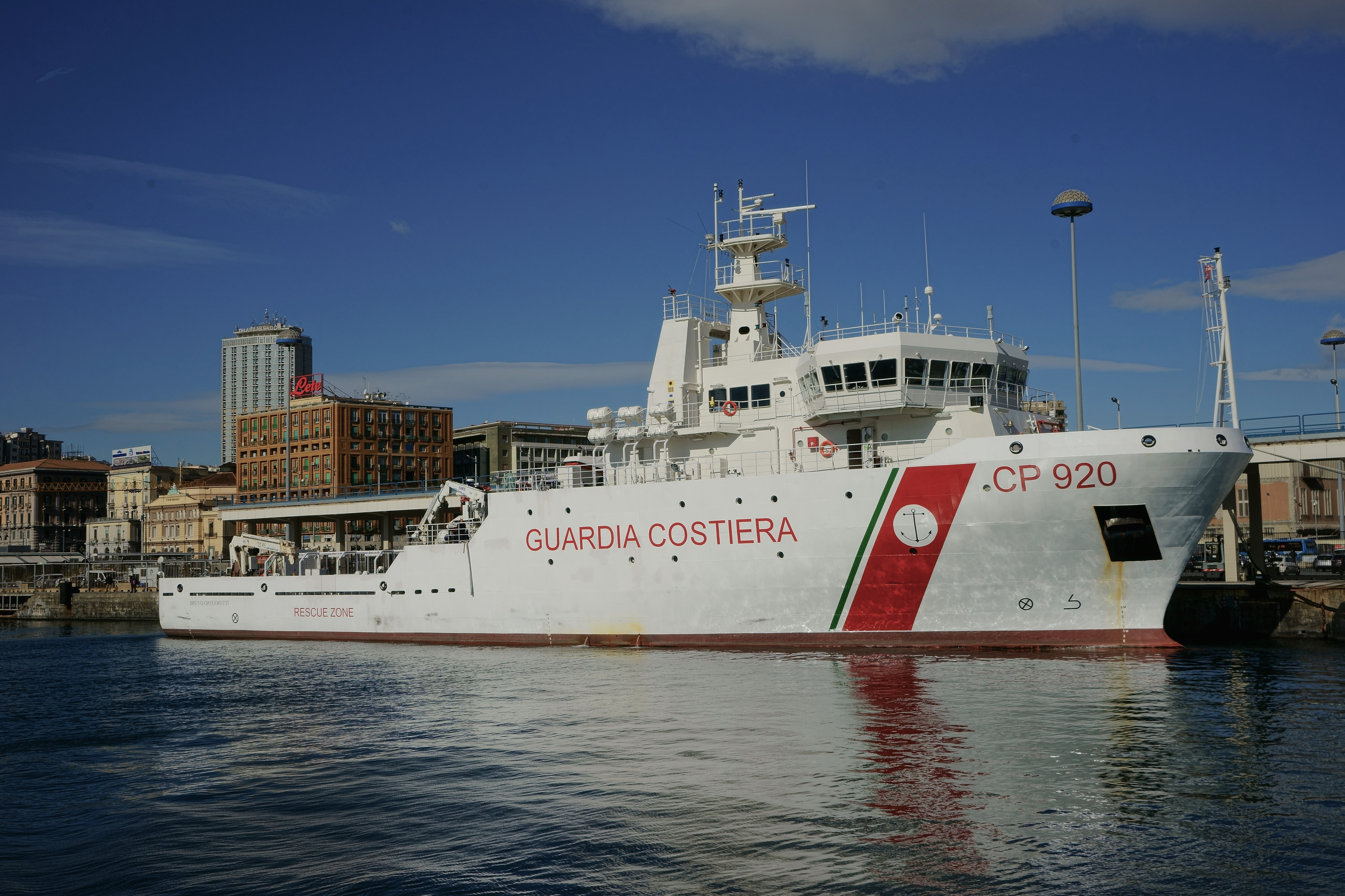 Nave Gregoretti della Guardia Costiera ormeggiata al molo Beverello di Napoli